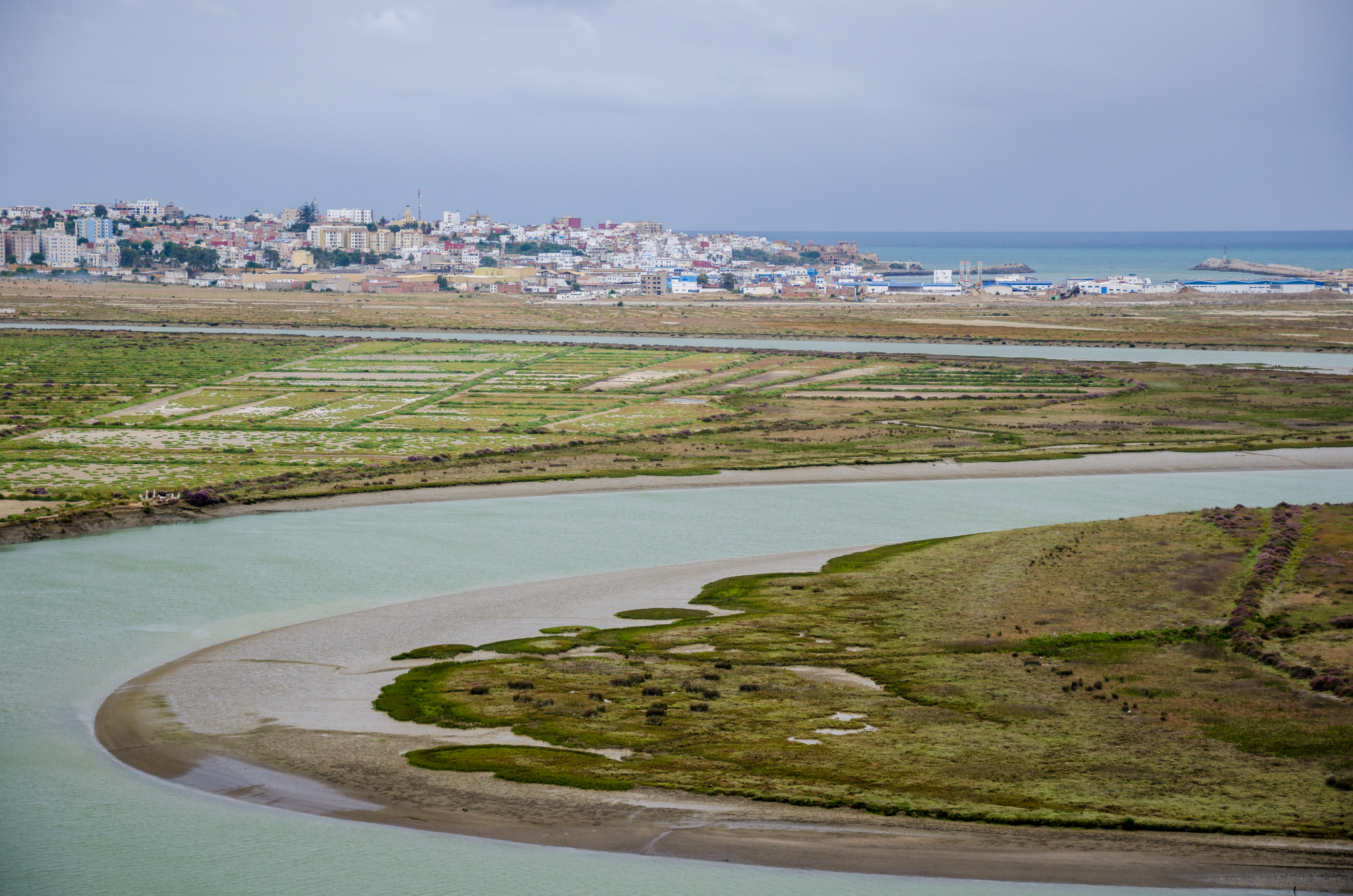 Устье реки Лукос у города Лараш. Вид со стороны Ликсуса.